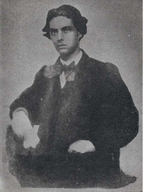 O escritor baiano Castro Alves quando moço